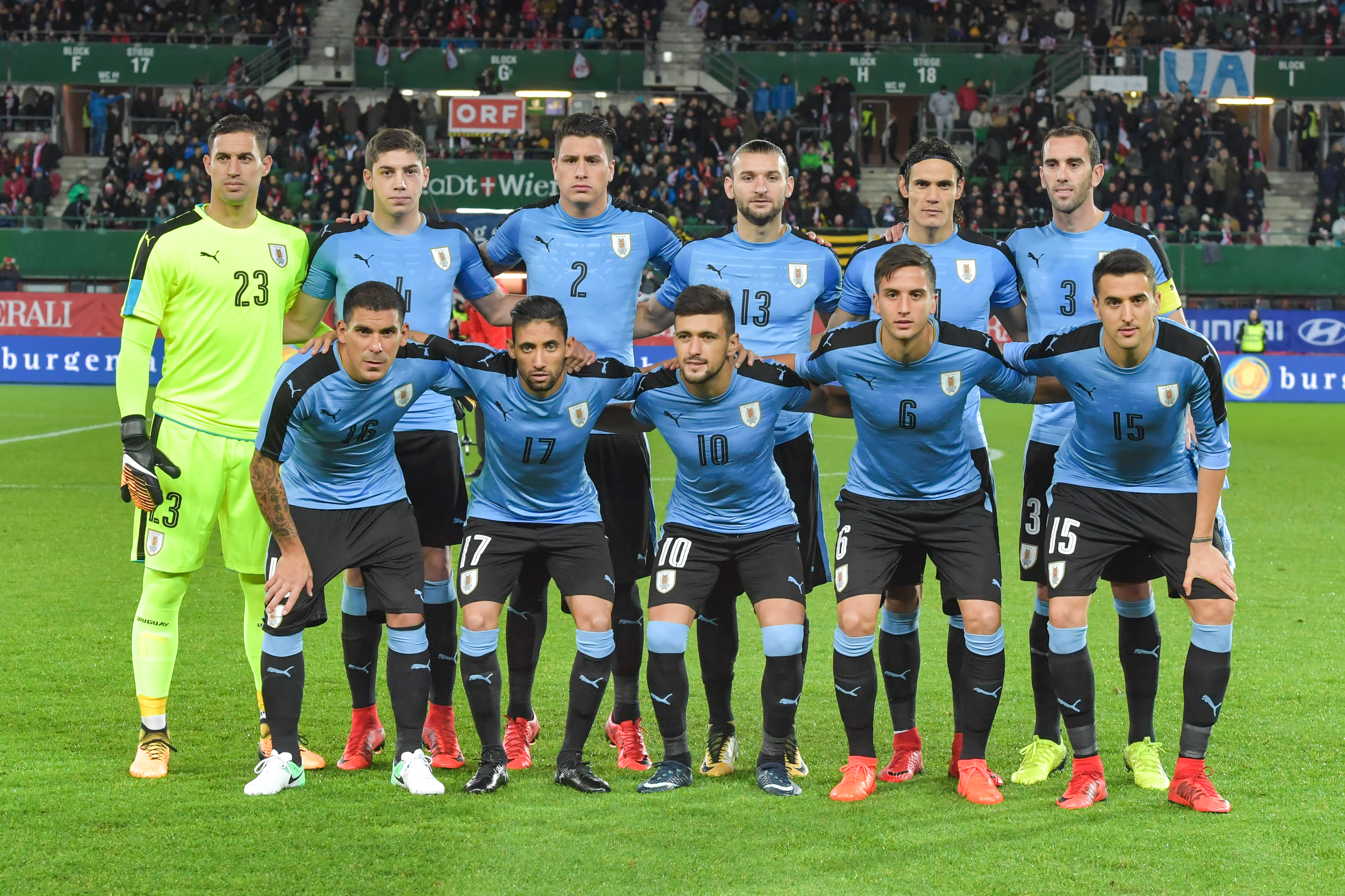 Wien, Österreich, 14.11.2017, Sport, Fussball, OEFB Freundschaftliches Laenderspiel - Österreich vs Uruguay. Bild zeigt das Nationalteam von Uruguay, 1. Reihe v.l. Maxi Pereira, Jonathan Urretaviscaya, Giorgian De Arrascaeta, Rodrigo Bentancur und Matias Vecino, 2. Reihe v.l. Martin Silva, Federico Valverde, Jose Maria Gimenez, Gaston Silva, Edinson Cavani und Diego Godin.